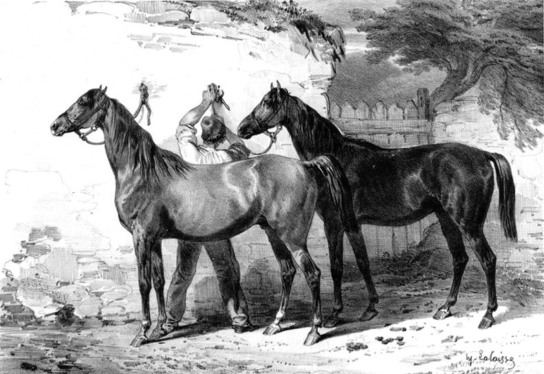 Chevaux d Auvergne cavalerie legere (vers 1850)